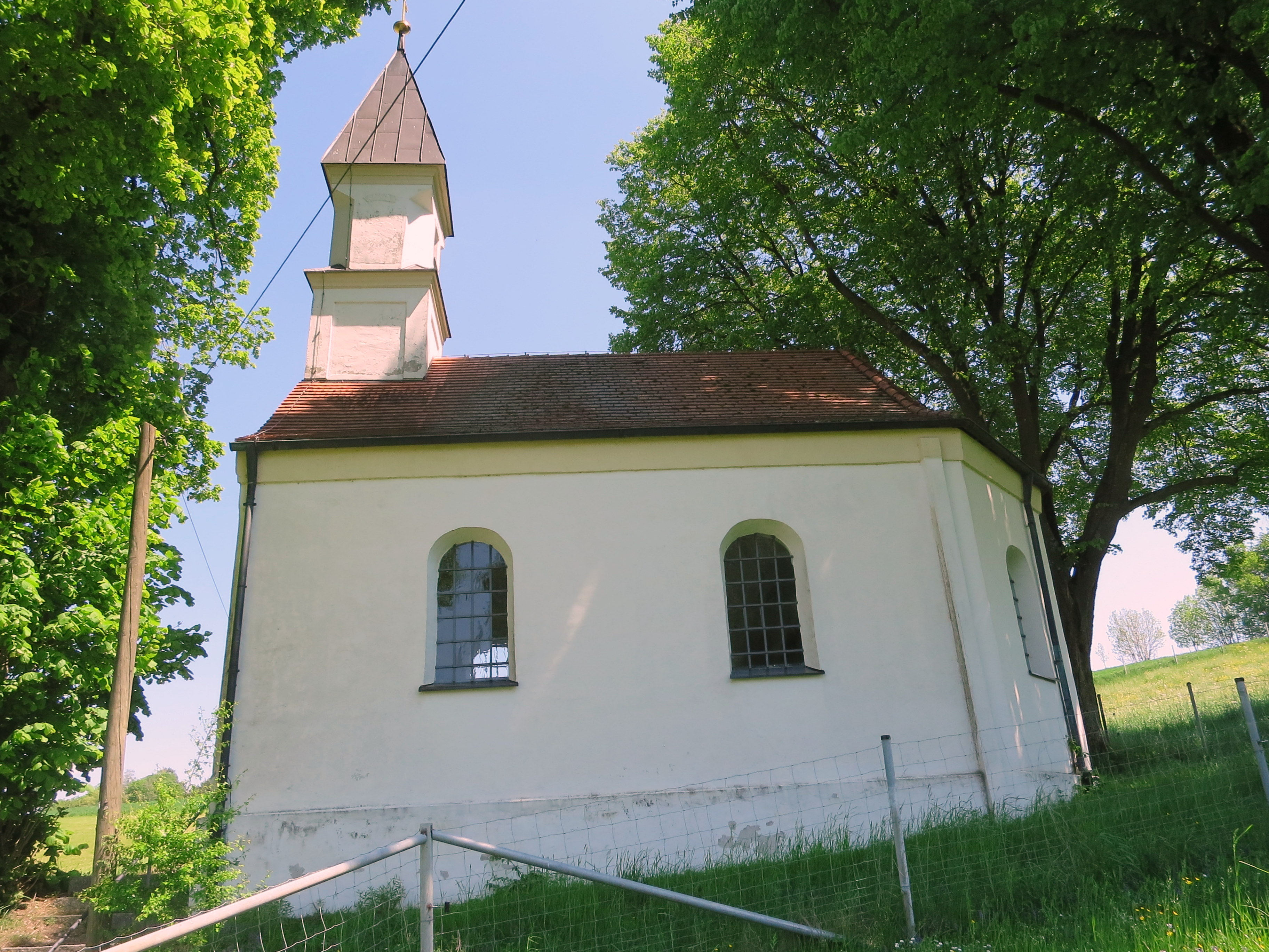 Eine kleine Wallfahrtskirche unterhalb von Baumgarten